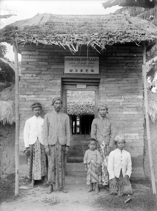 Negatief. Portret van een mantri van een opiumverkoopplaats in Oeboed met familie